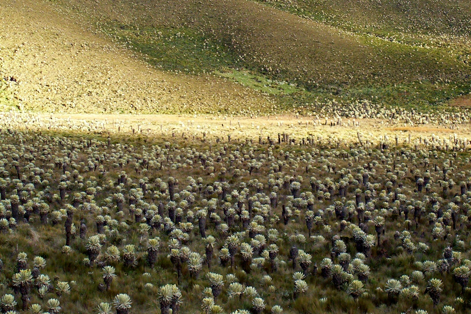 Espeletia pycnophylla. Frailejones en el páramo de Chiles, Ecuador